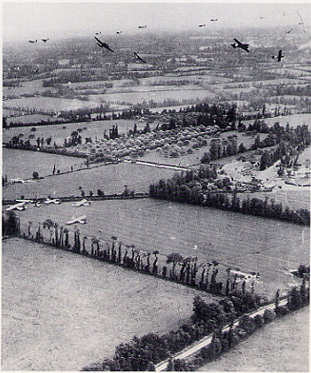 "Glider Attack on D-Day. Some American glidermen in both Horsas and CG-4As having already landed, more gliders continue to cut loose to commence their attack." (From The Glidermen of Neptune page 70 - Photo from National Archives)